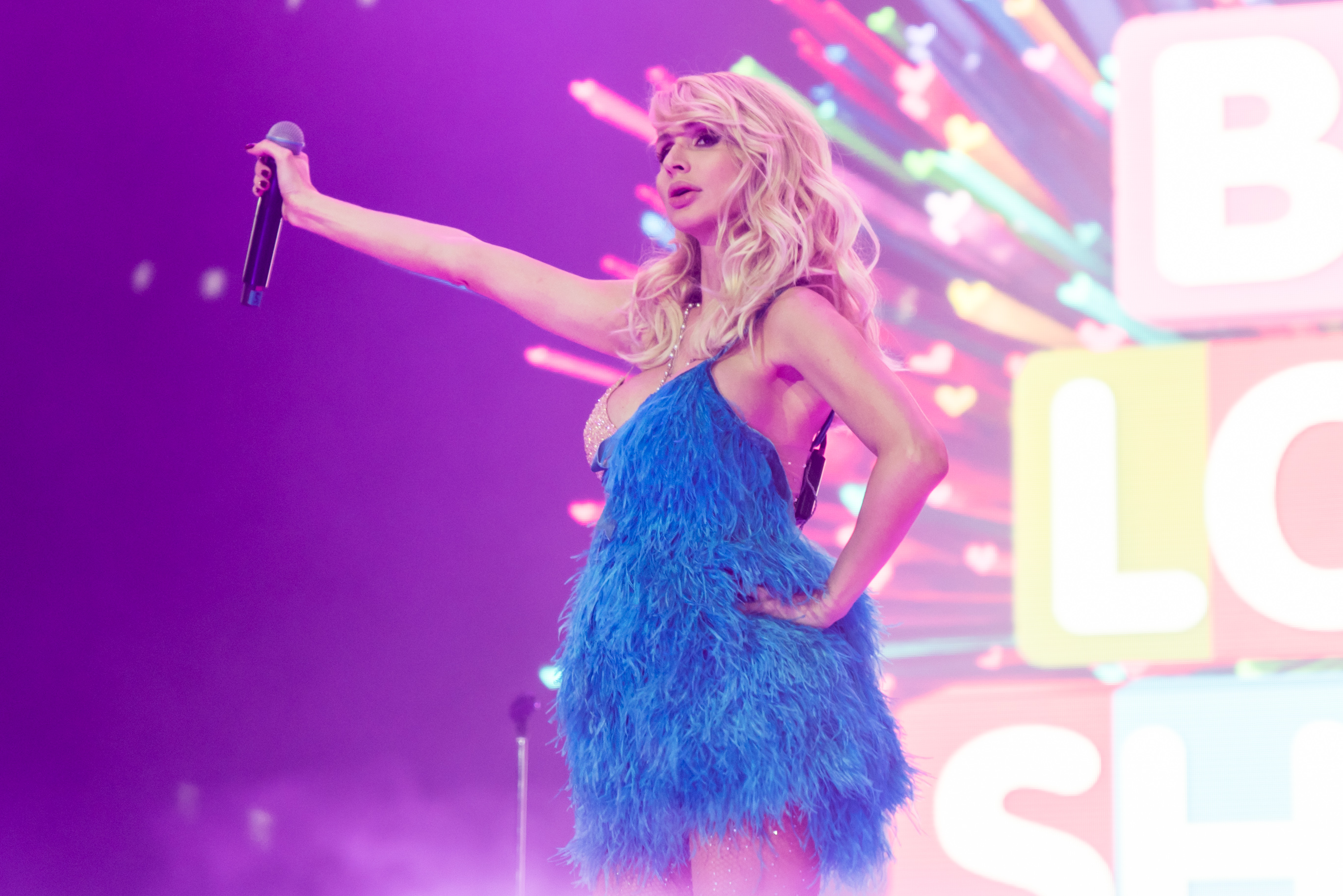 LOBODA на Big Love Show 2018 в СПб